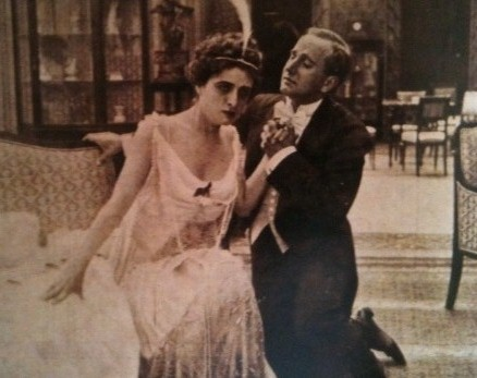 Foto di scena del film La signora delle camelie di Gustavo Serena (1915)